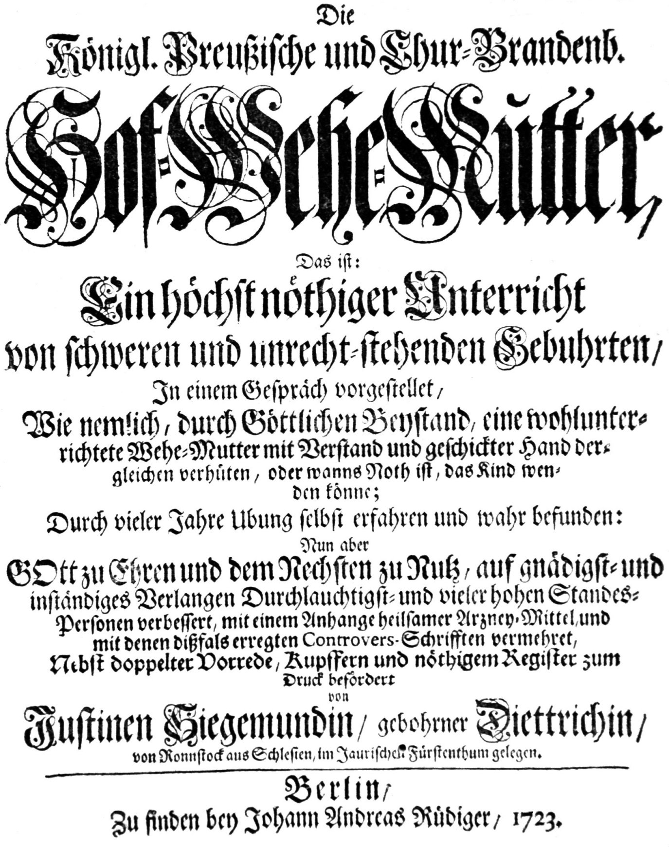 Justina Siegmundin - strona tytułowa książki z 1690 r.